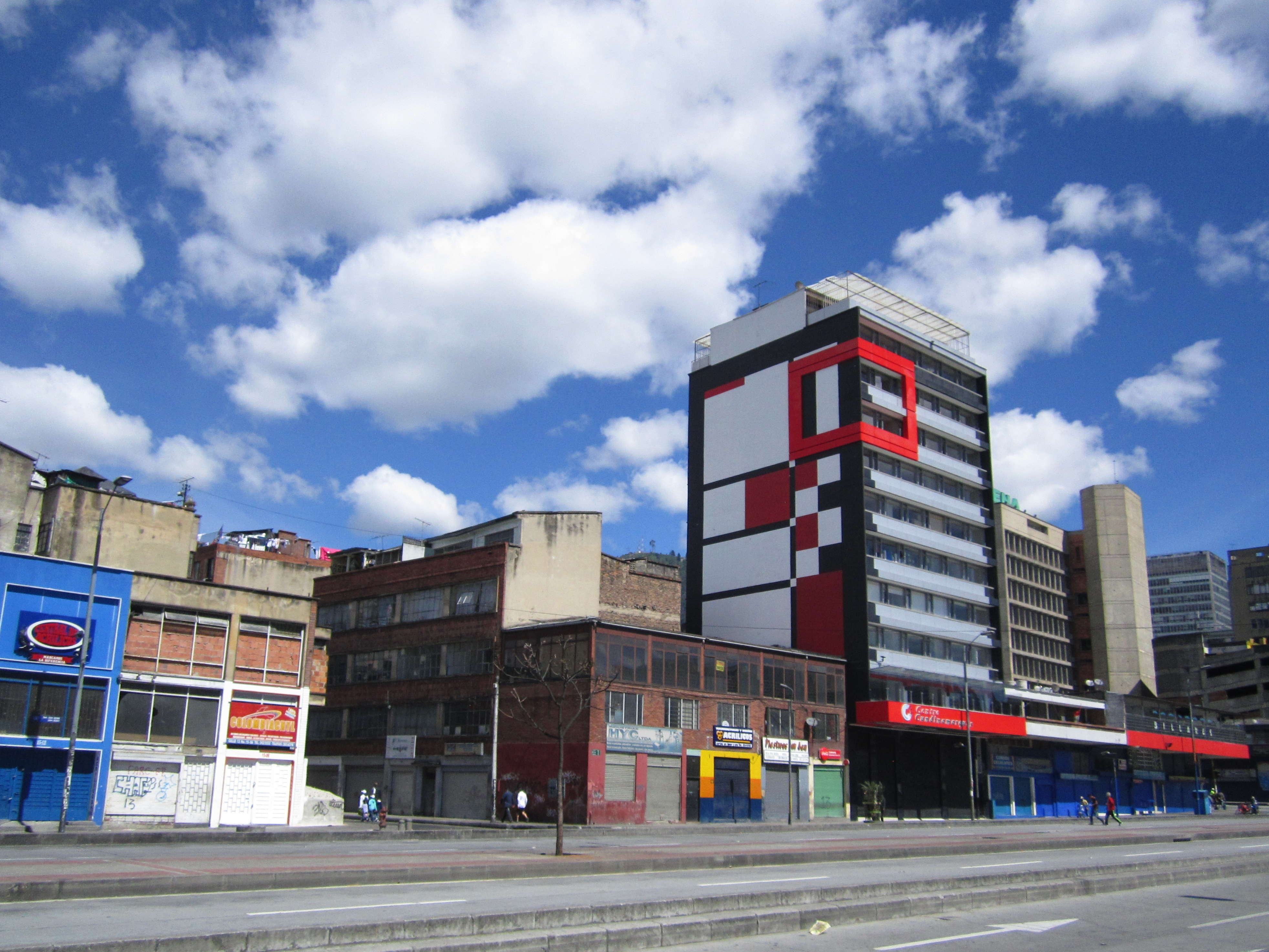 Avenida Jiménez entre Caracas y Quince, barrio San Victorino, localidad de Los Mártires, ciudad de Bogotá.